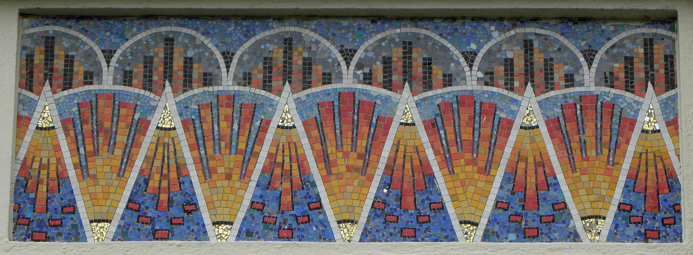 Mosaïques d'Isidore Odorico ornant l'usine Morel et Gâté de Fougères (35).